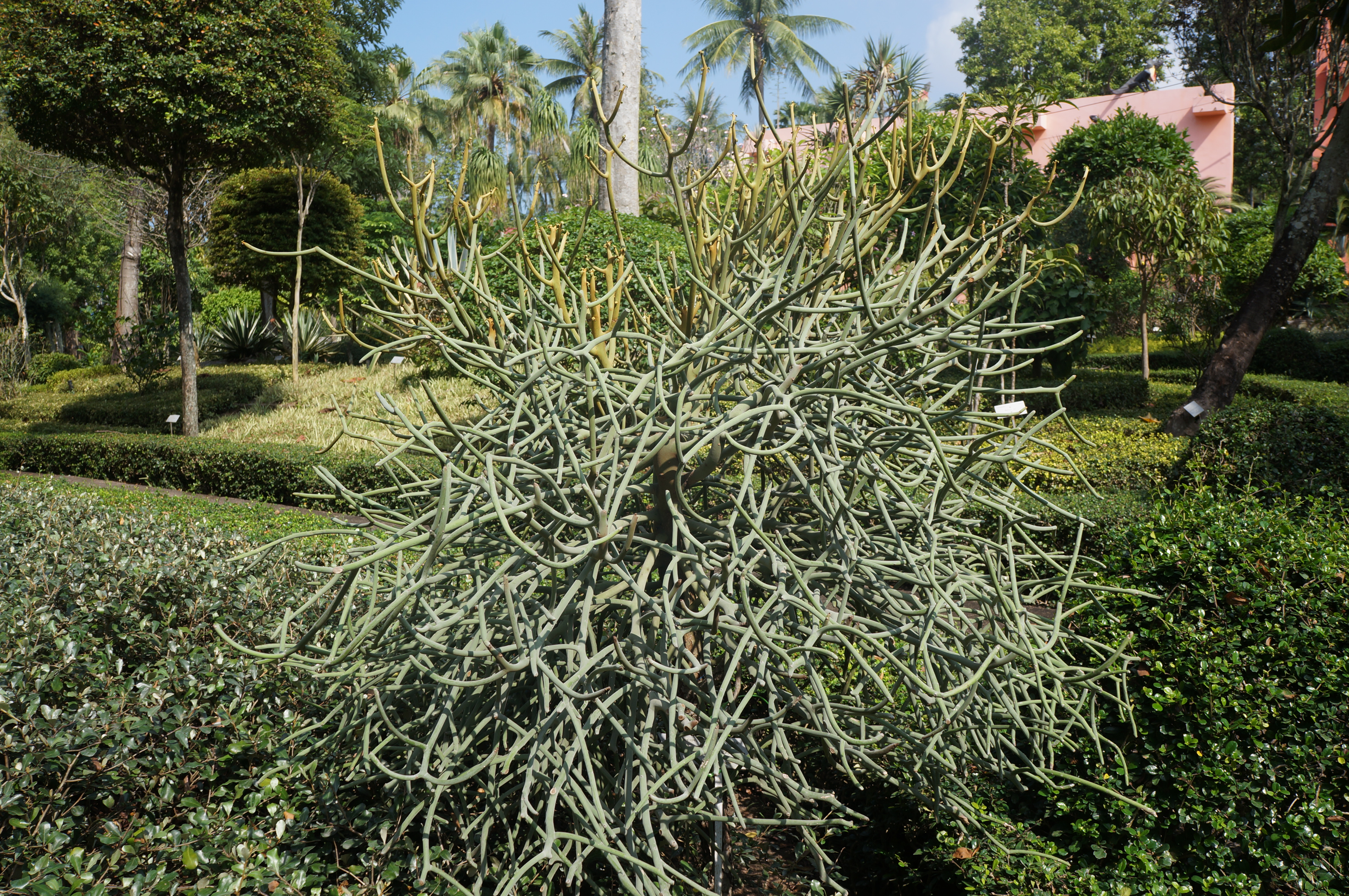 Euphorbia kamponii in the Botanical Garden Nong Nooch. Pattaya.